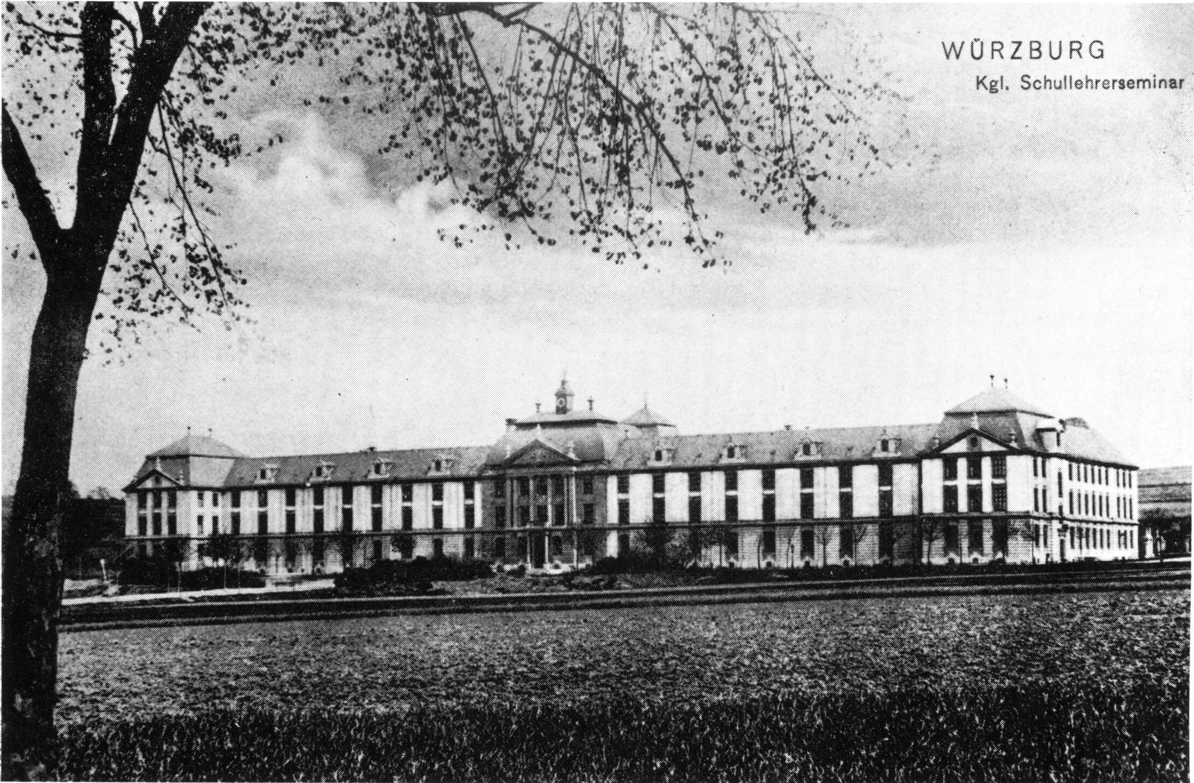 Matthias-Grünewald-Gymnasium Würzburg; Foto Lehrerbildungsanstalt Wittelsbacherplatz; Festschrift 1970 S. 6; Hrsg. Direktorat MGGW.